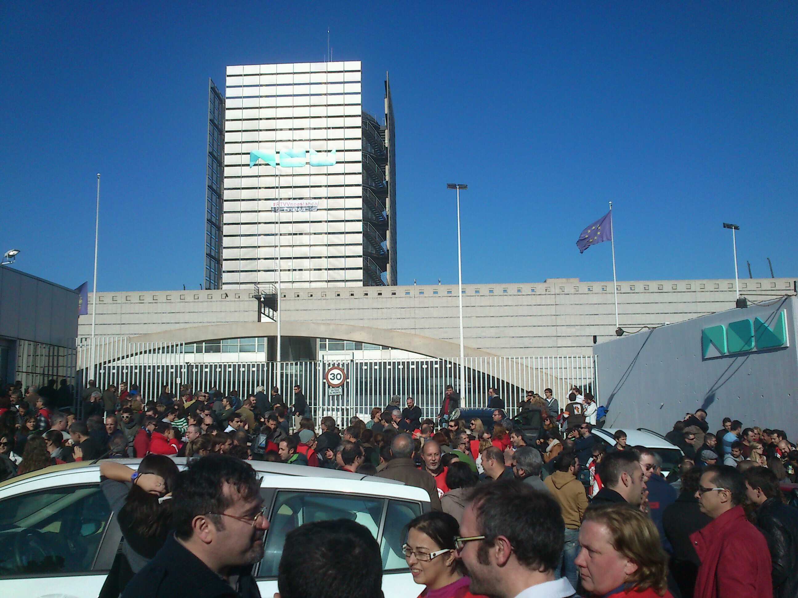 Concentració davant la seu de RTVV el dia que la tancaren.